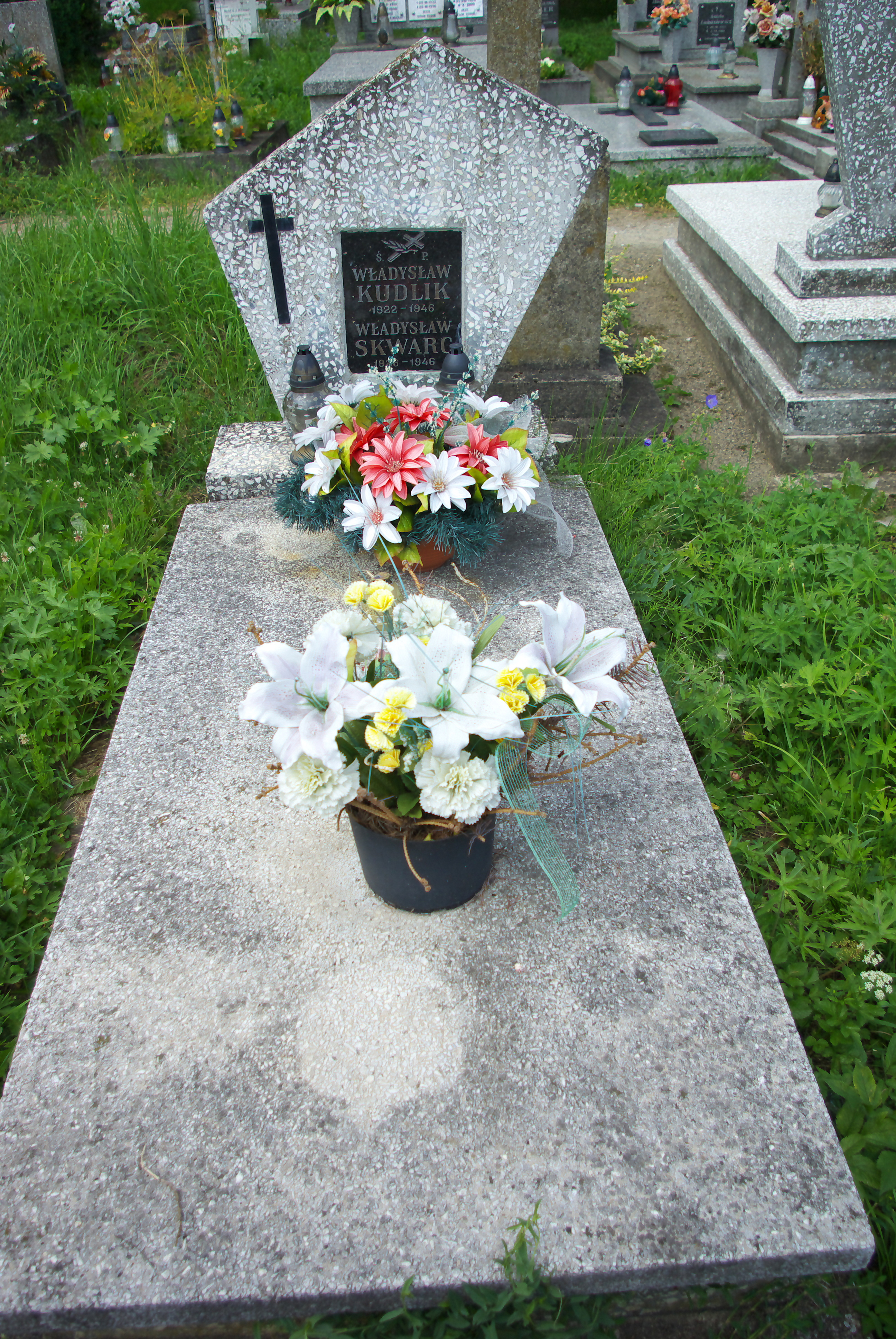 Grób wspólny Władysława Kudlika i Władysława Skwarca w części "Matejki Stary" Cmentarza Centralnego w Sanoku.